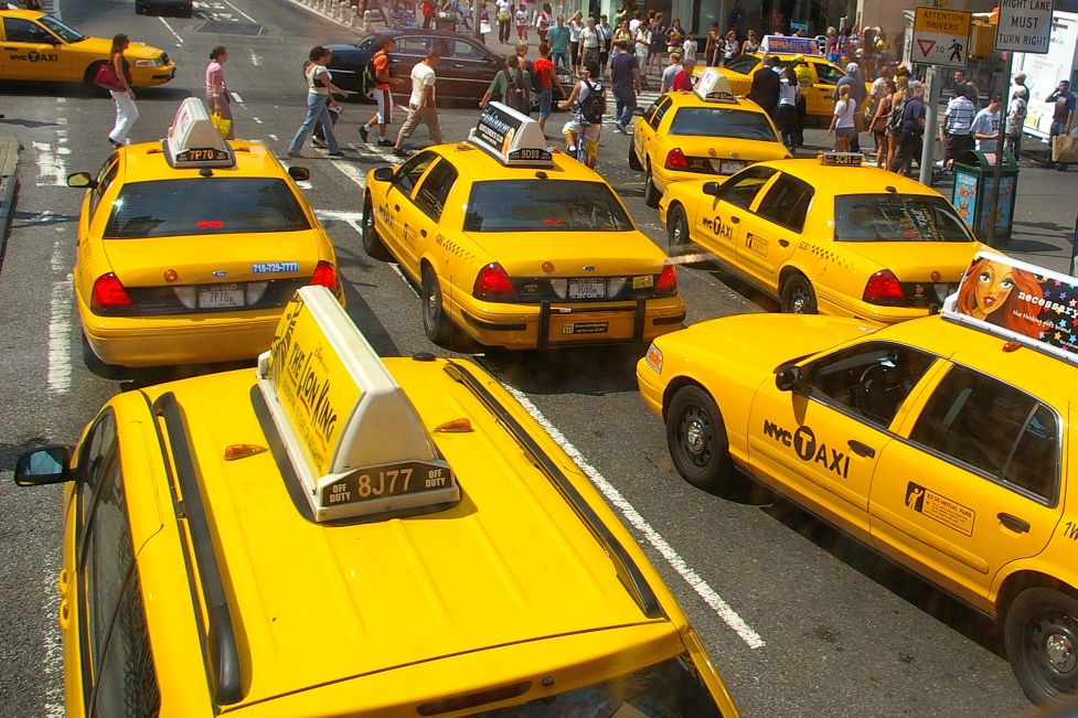 Gelbe Taxis in New York City